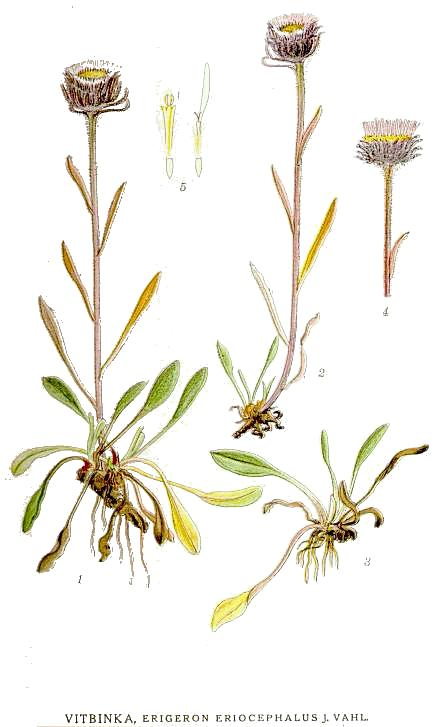 Erigeron eriocephalus J. Vahl.